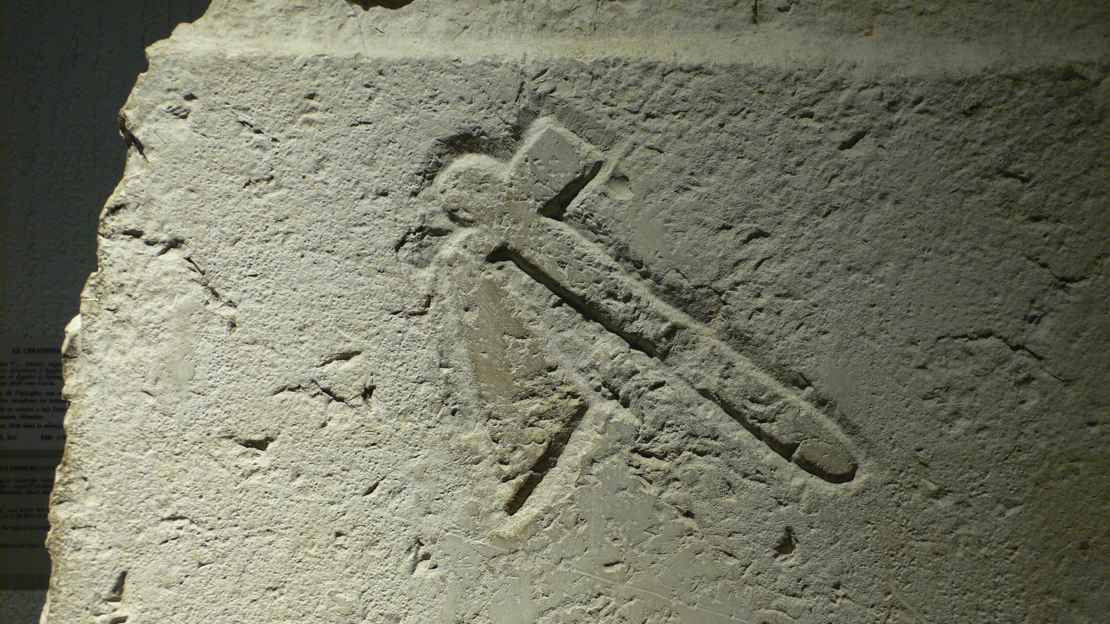 Musée gallo-romain de Fourvière (Lyon) : Épitaphe du céramiste Trévère A...ranius V... (plusieurs interprétations : Granius, Turranius ou Afranius) - Détail du sigle de l'ascia Ref : CIL 13, 02033